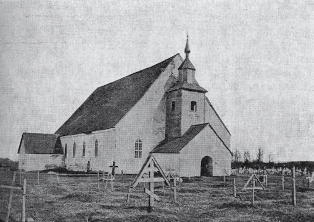 Кирха в деревне Молосковицы до ремонта 1902 года.